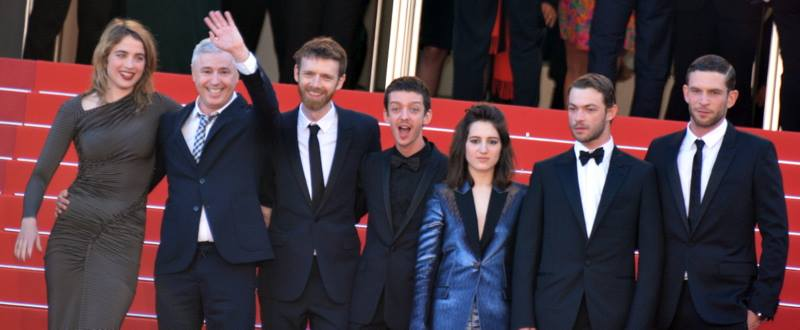 Adèle Haenel, Robin Campillo, Antoine Reinartz, Nahuel Pérez Biscayart, Aloïse Sauvage, Félix Maritaud, Arnaud Valois. Festival de Cannes